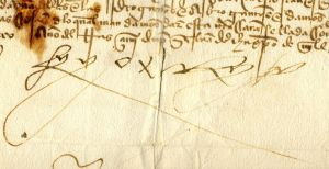 Firma de Fernando el Católico